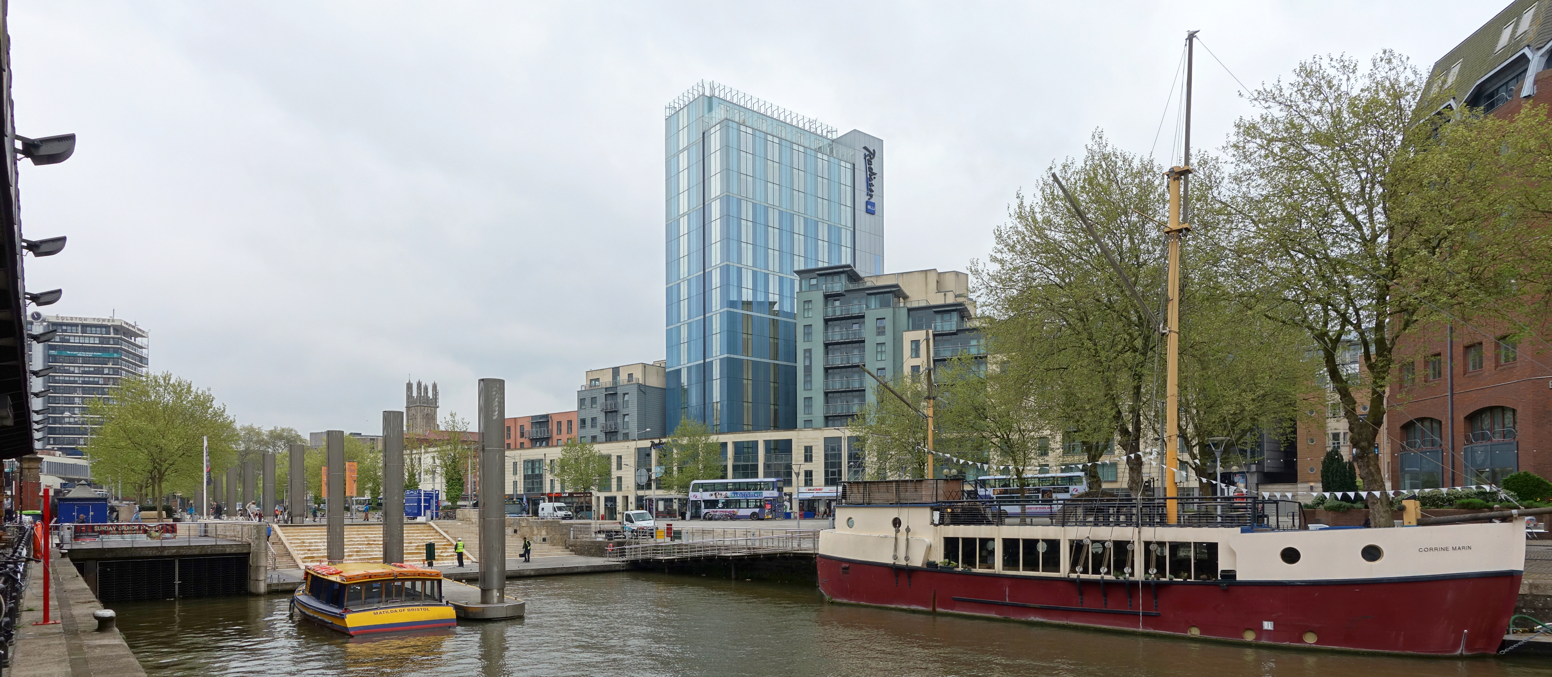 St Augustine's Reach dans le port de Bristol.